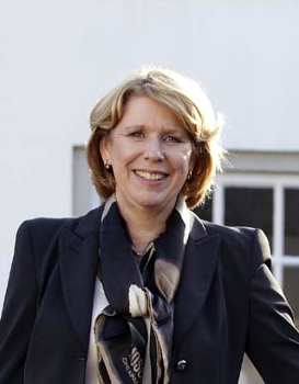 C.M. (Corien) Wortmann-Kool (Oud-Alblas, 27 juni 1959) is een Nederlandse politica. Namens het Christen-Democratisch Appèl (CDA) is ze sinds 2004 lid van het Europees Parlement.